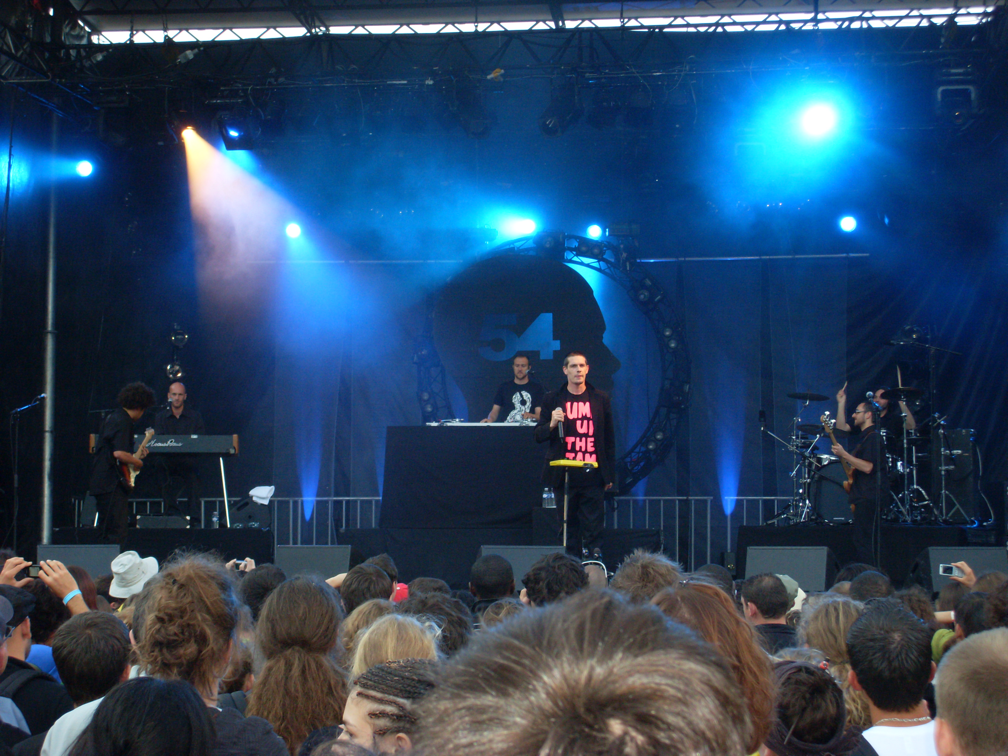 Hocus Pocus au festival Terres de Son à Monts.